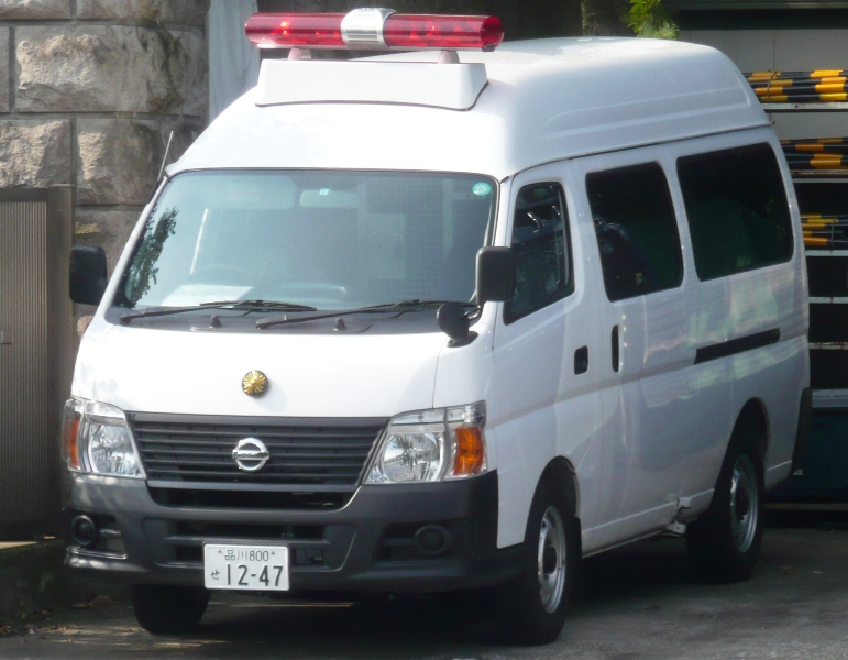 警視庁の小型護送車。